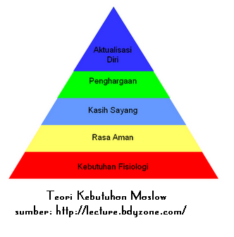 Teori Kebutuhan Maslow